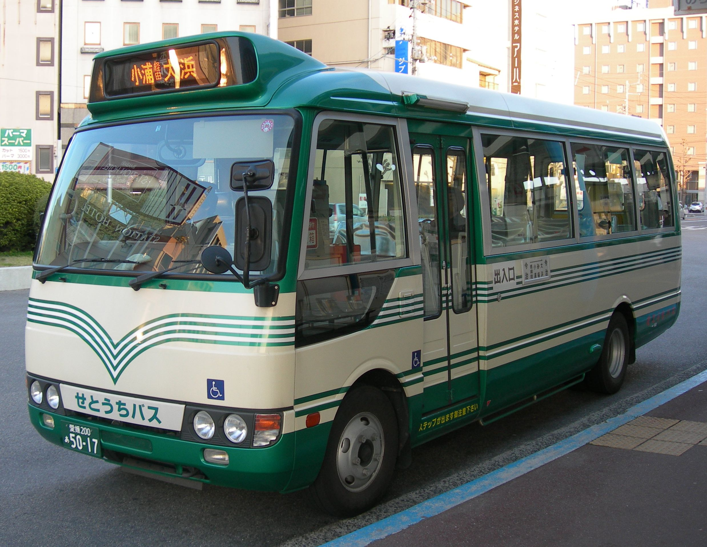 瀬戸内運輸 路線バス